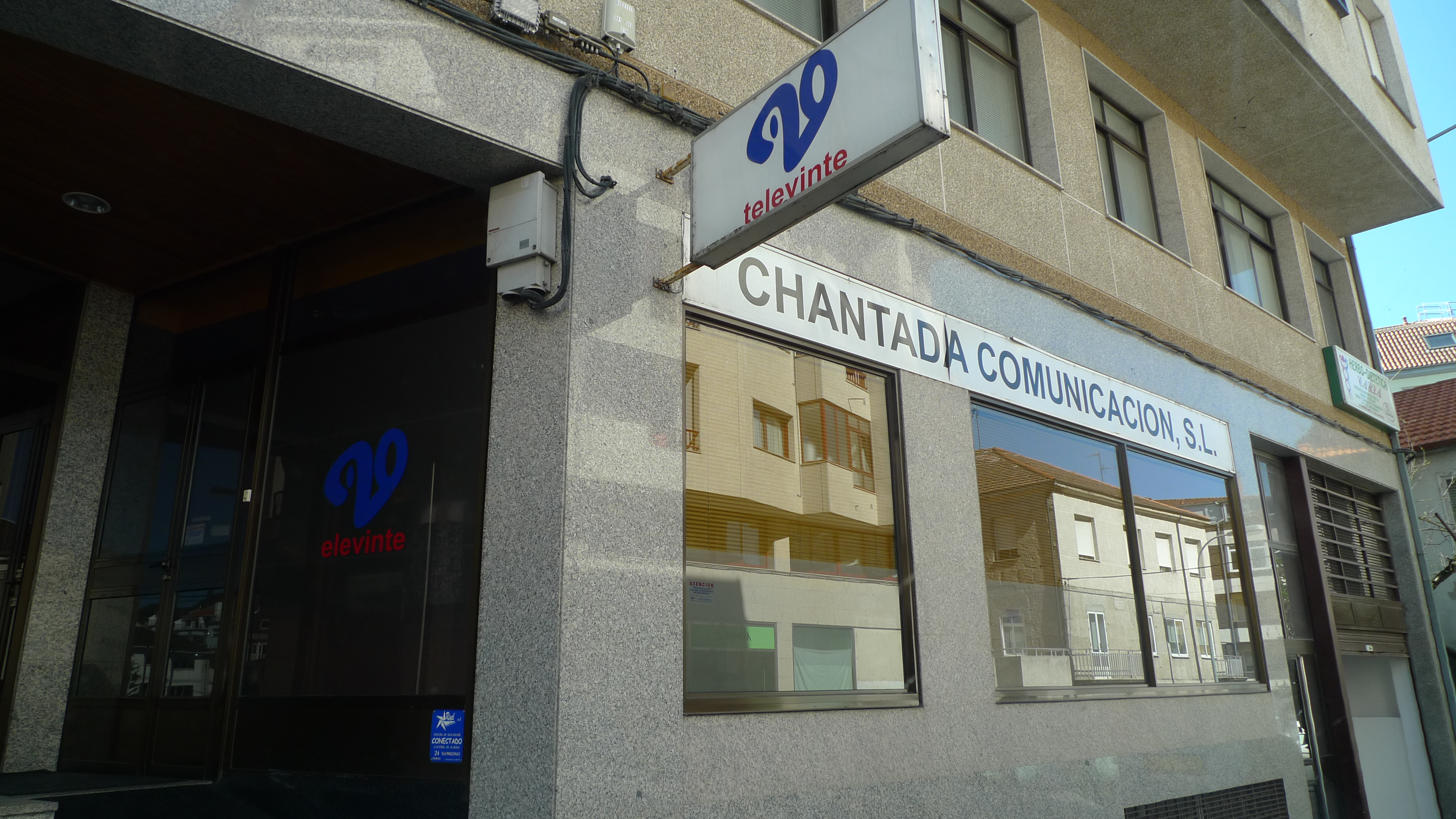 Televisión local de Chantada Televinte